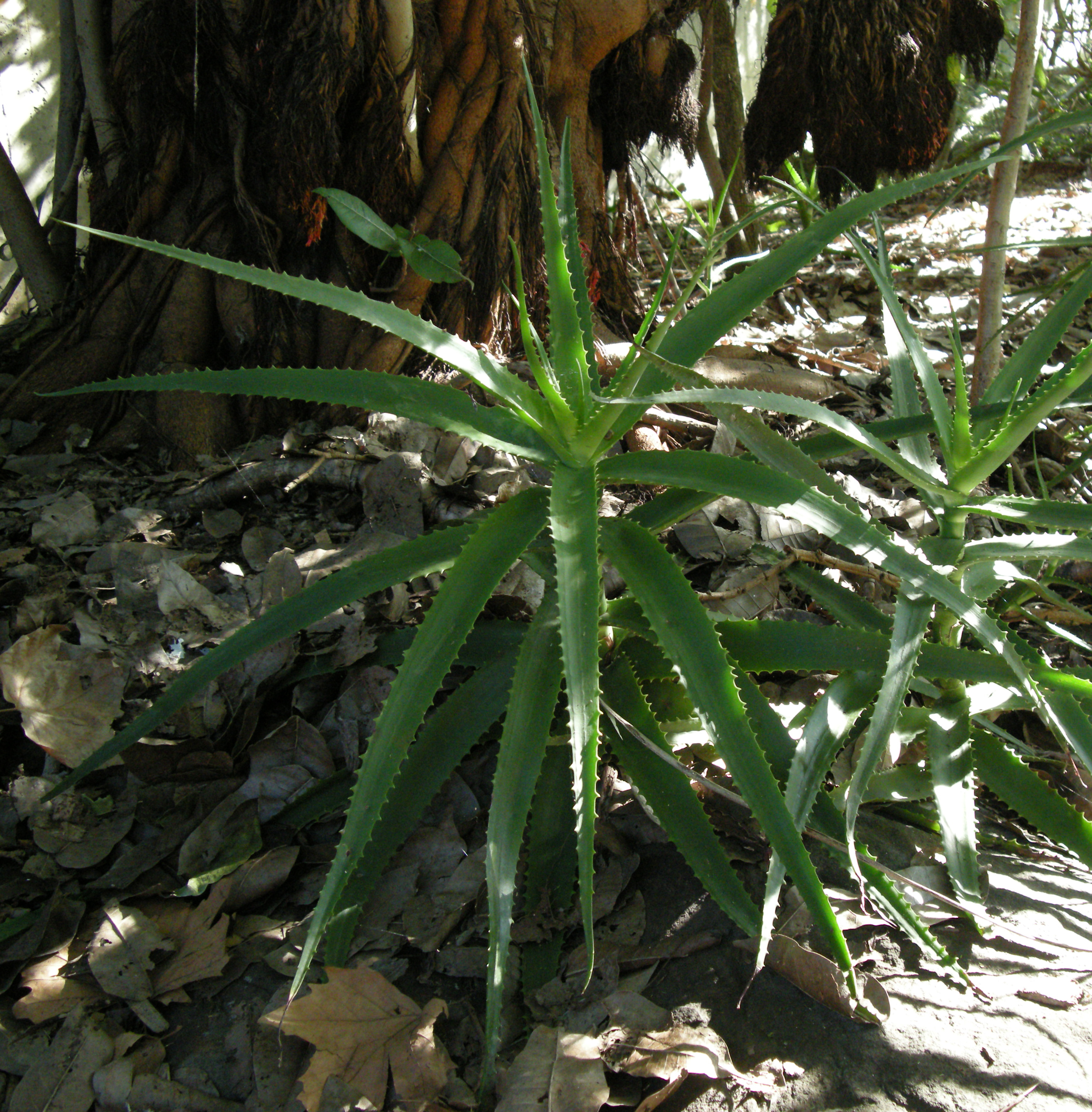 Aloe bulbilifera var. bulbilifera